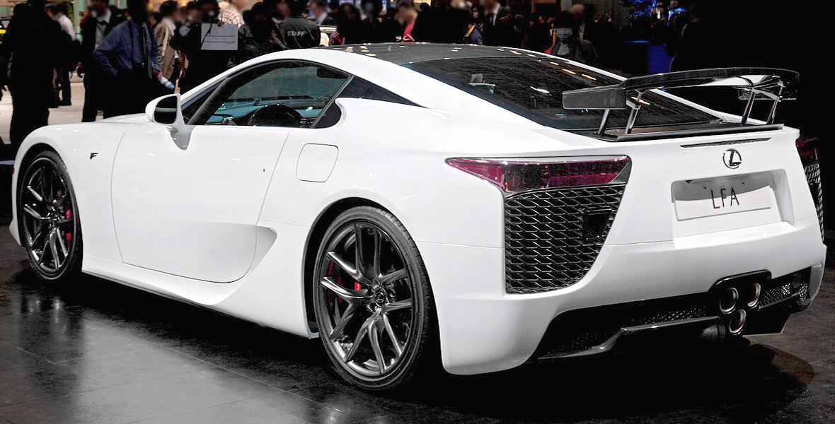 Lxus LFA.